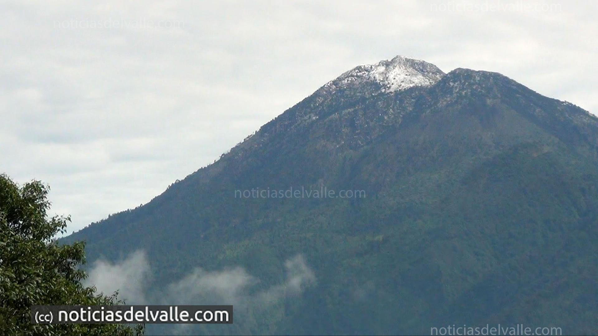 El volcán Tajumulco que se encuentra en el altiplano del departamento de San Marcos, se cubrió de blanco, por lo que pudo ser observado varios kilómetros a la redonda por pobladores de la region.